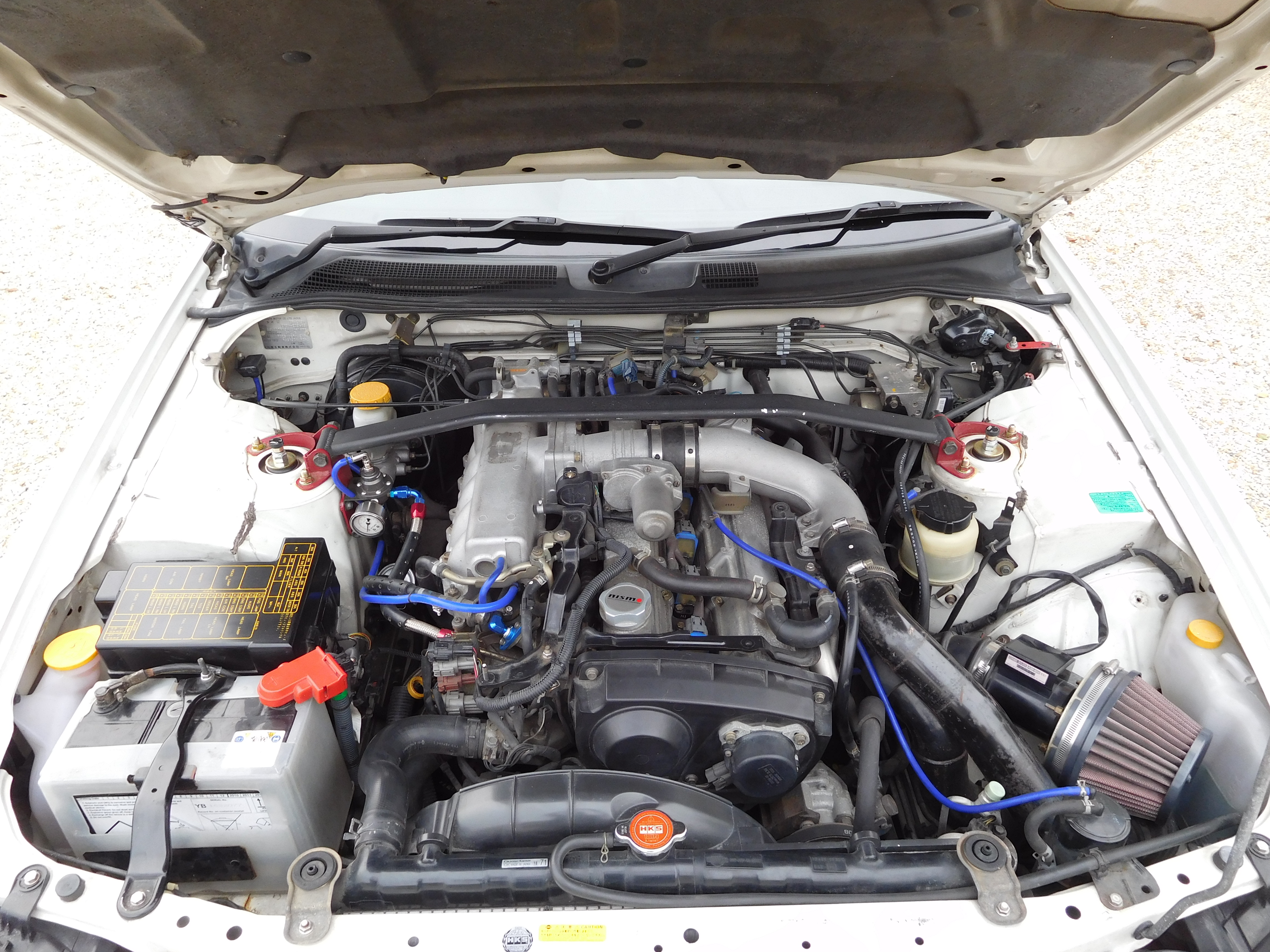 Moteur 6-cylindres 2,5 L turbo, porté à 306 ch, d'une Nissan Skyline R34 GTT de 2000.